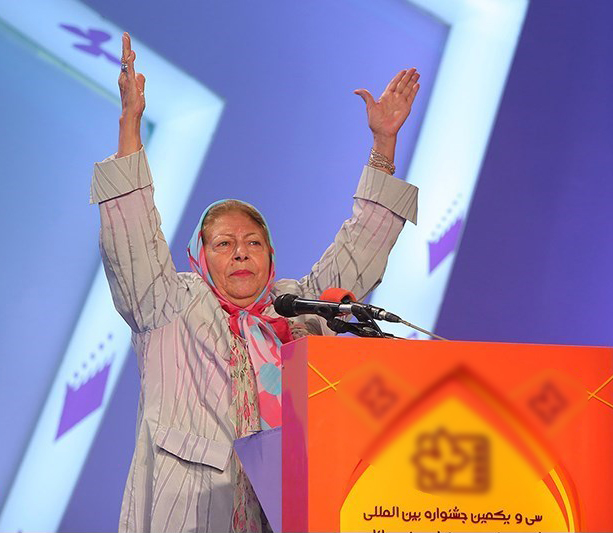 ثریا قاسمی اختتامیه سی ویکمین جشنواره بین المللی فیلمهای کودکان و نوجوانان